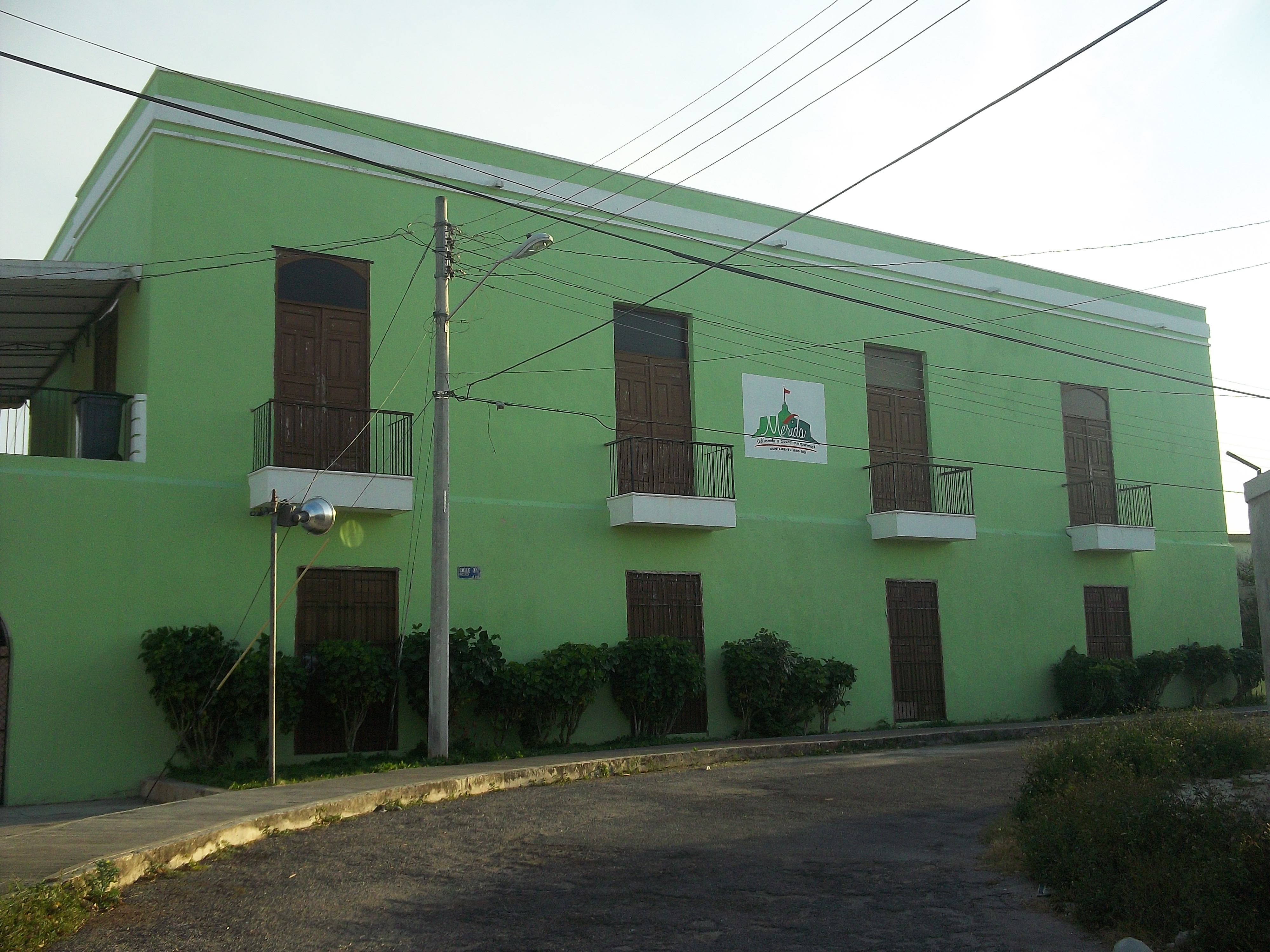 Hacienda Wallis, Yucatán.